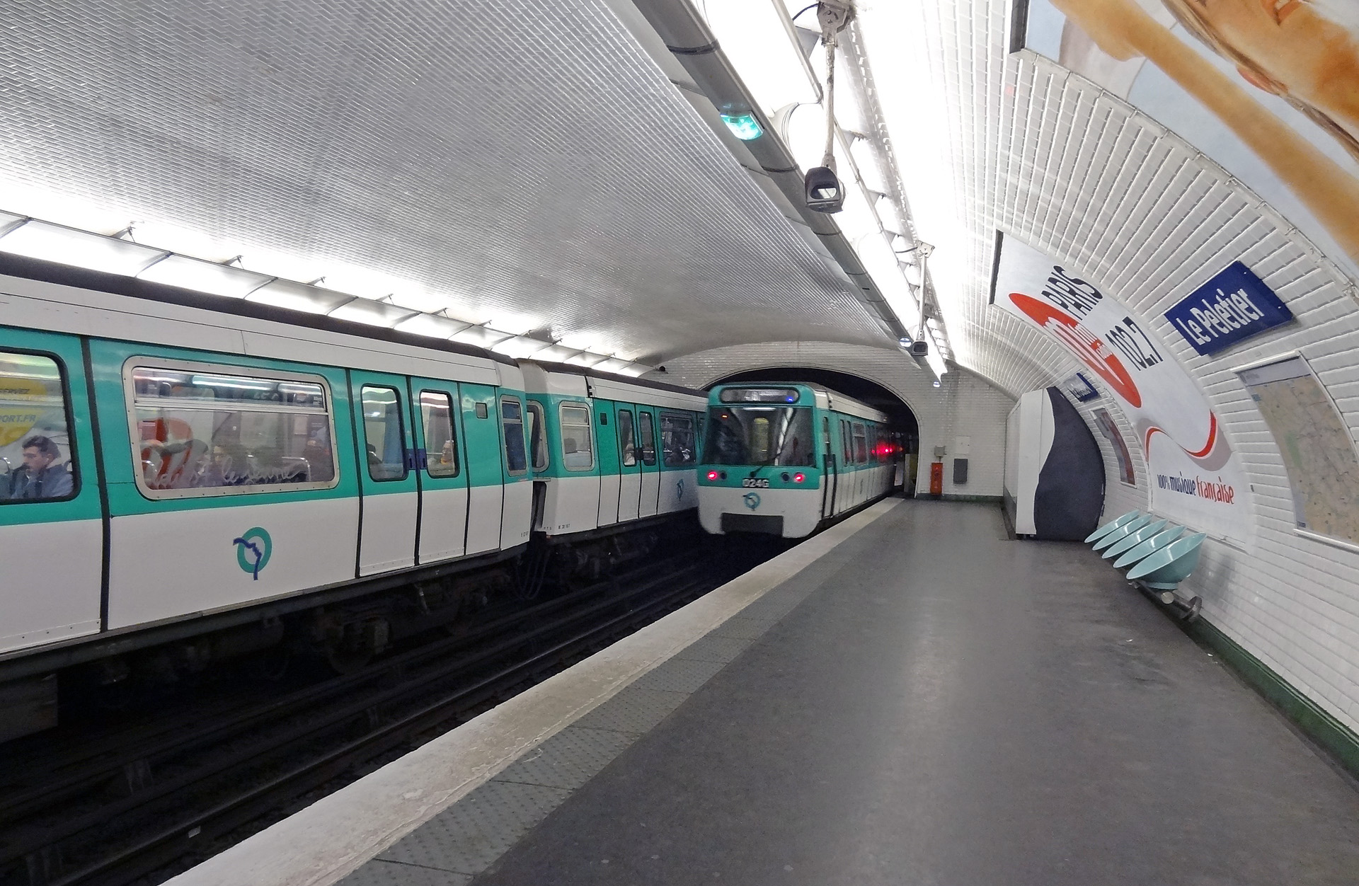 Station Le Peletier de la ligne 7 du métro de Paris, France.